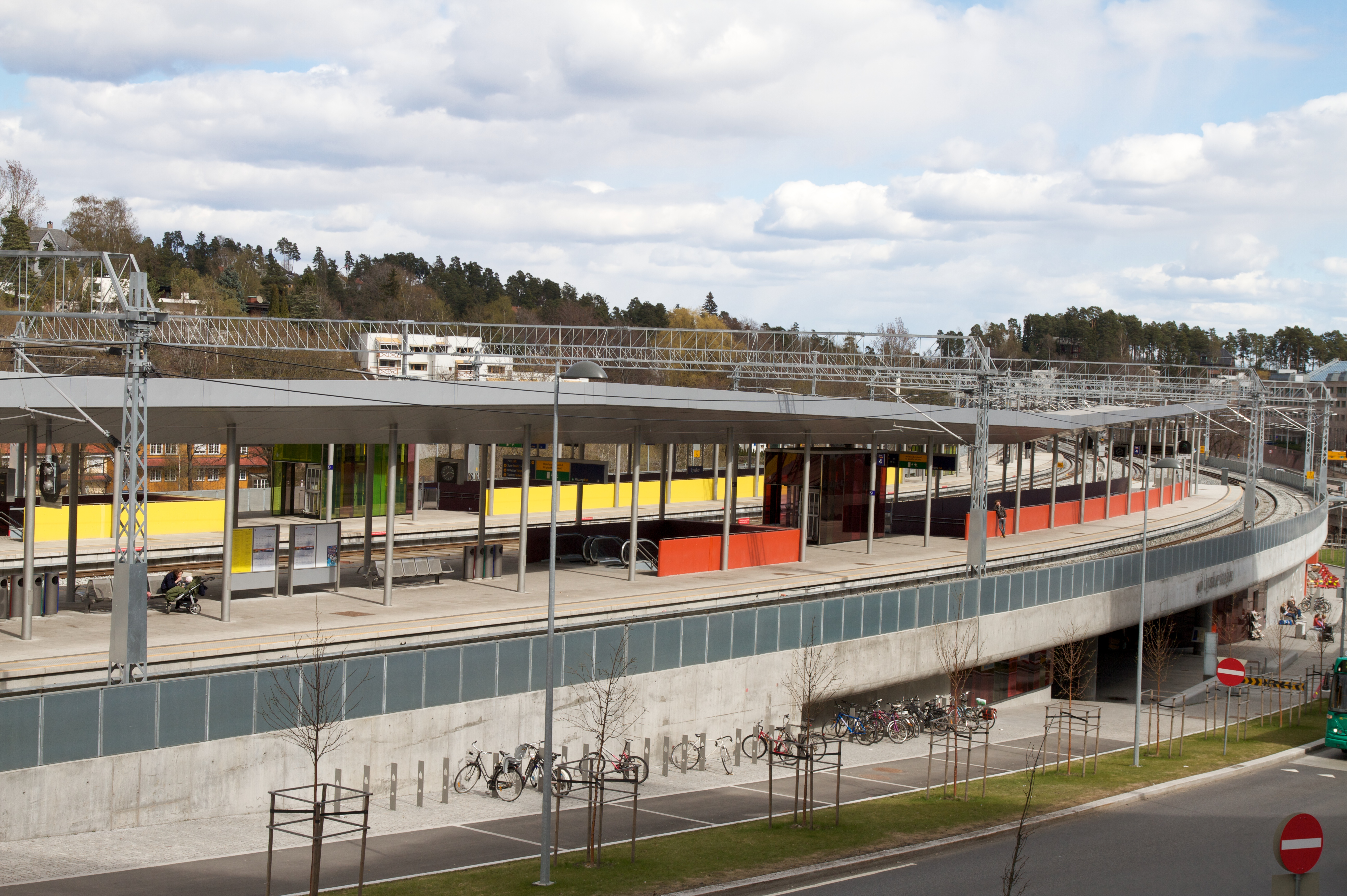 Lysaker stasjon i Bærum.